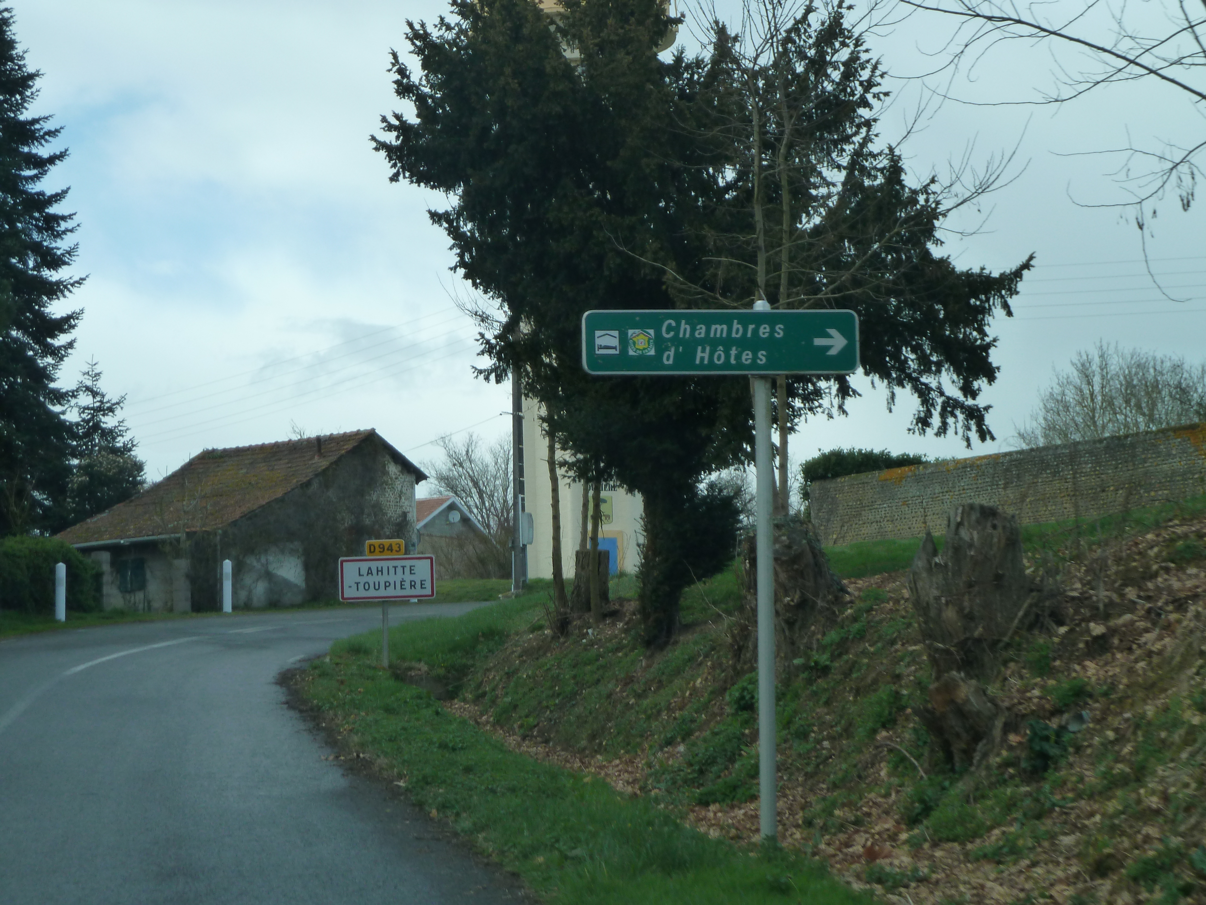 Entrée dans Lahitte-Toupière